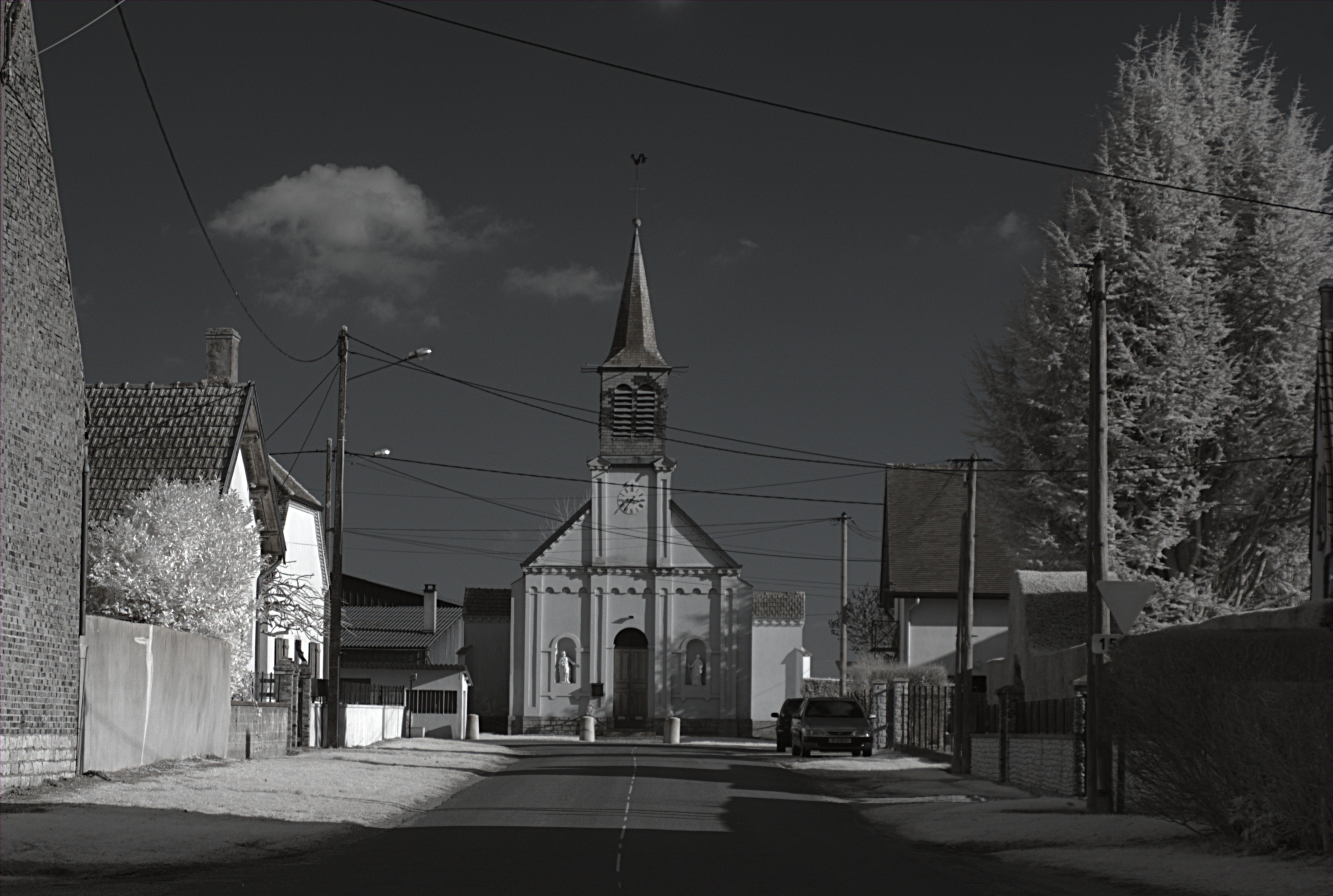 Église Saint-Sébastien, Labruyère (Côte d'Or, Bourgogne, France) photographié avec un filtre infrarouge 760 nm.